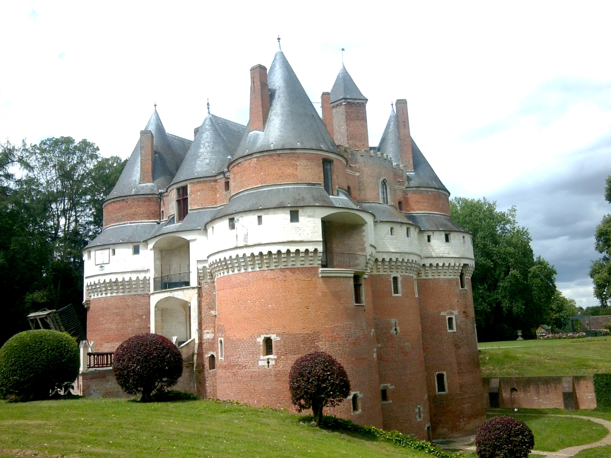 "Le château de Rambures est un château fort situé à Rambures, en France. Construit au xve siècle, c'est un des rares châteaux du Moyen Âge à subsister dans le département. De plan original, c'est aussi un chef d'œuvre de l'architecture militaire médiévale tardive. Ce château fait l'objet d'un classement au titre des monuments historiques depuis le 23 février 19273." Présentation Wikipédia.